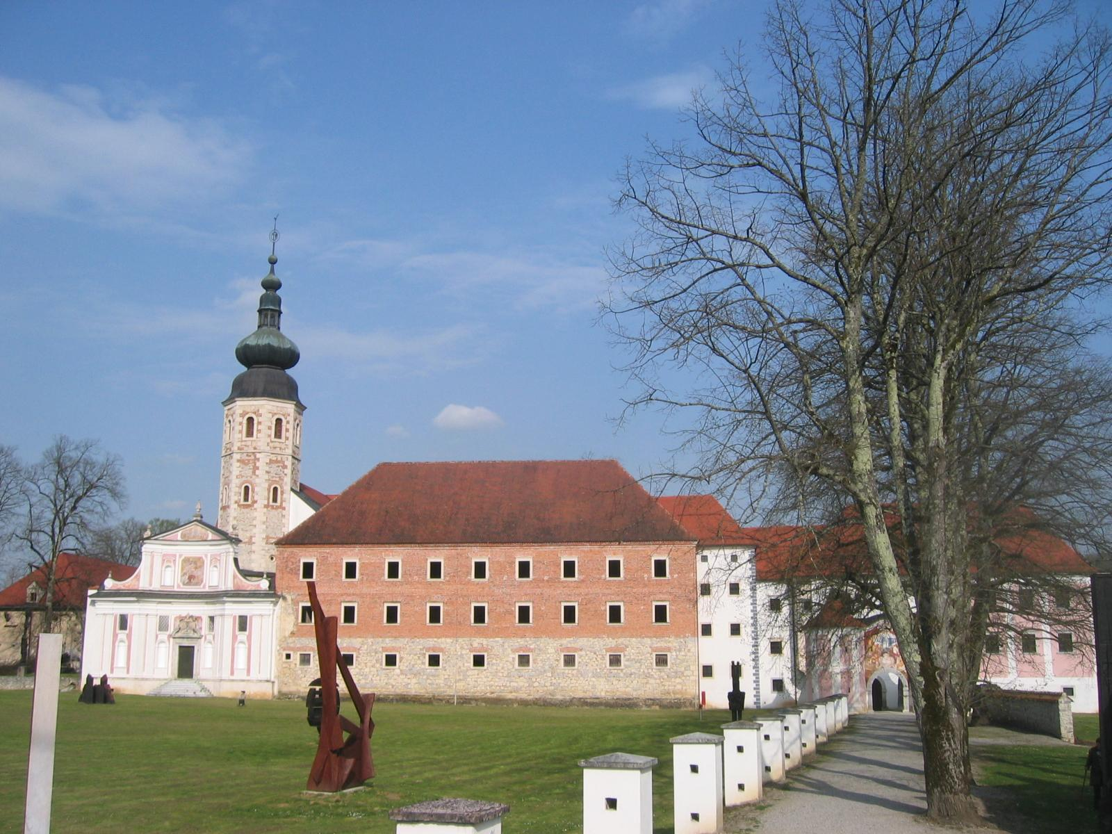 Castle (monastery) Kostanjevica na Krki, Slovenia photo:Ziga 07:45, 2 April 2007 (UTC)